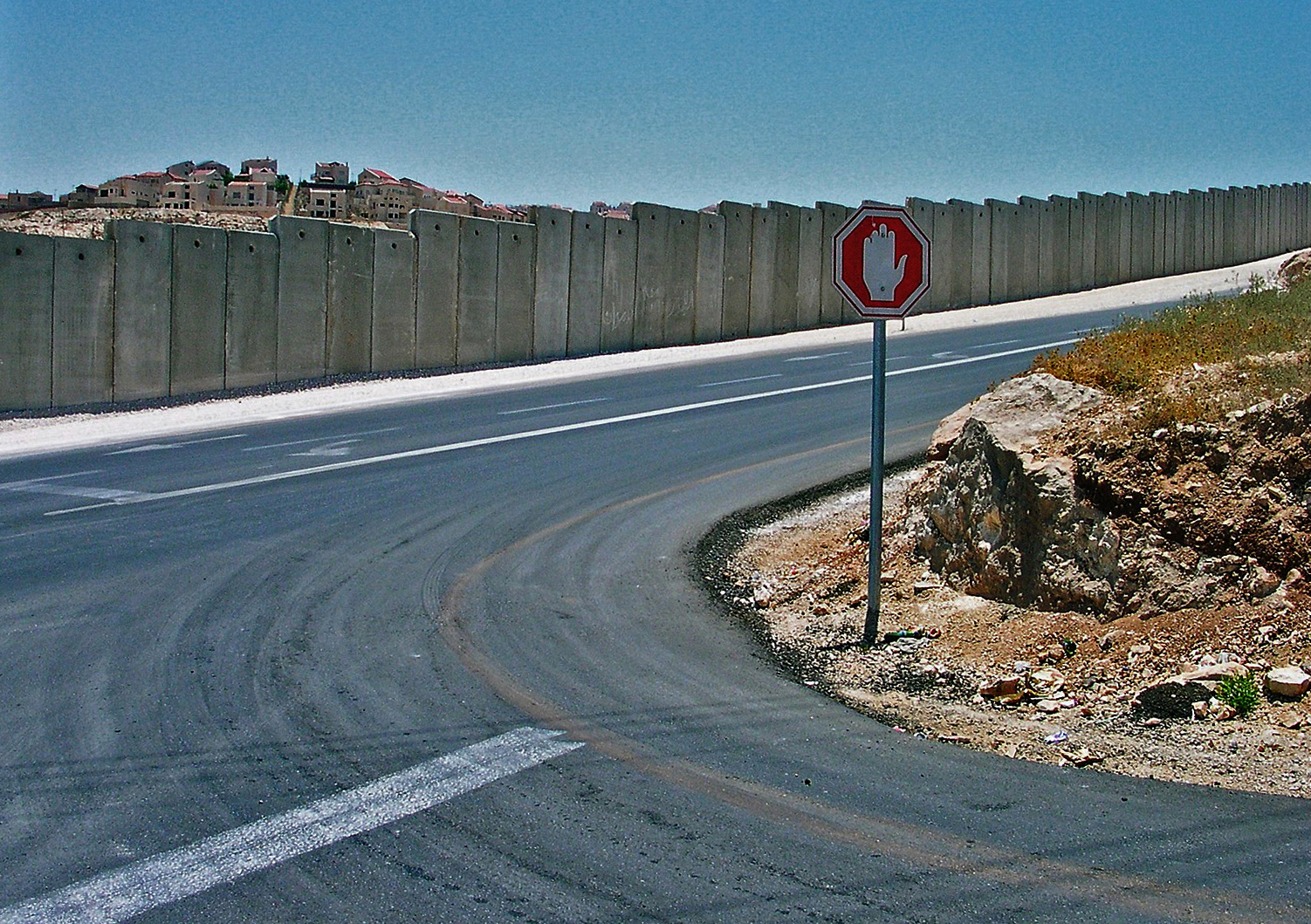 Mur de séparation israélien, près de Jérusalem. [11 juillet 2005] Auteur : Utilisateur:Simio.